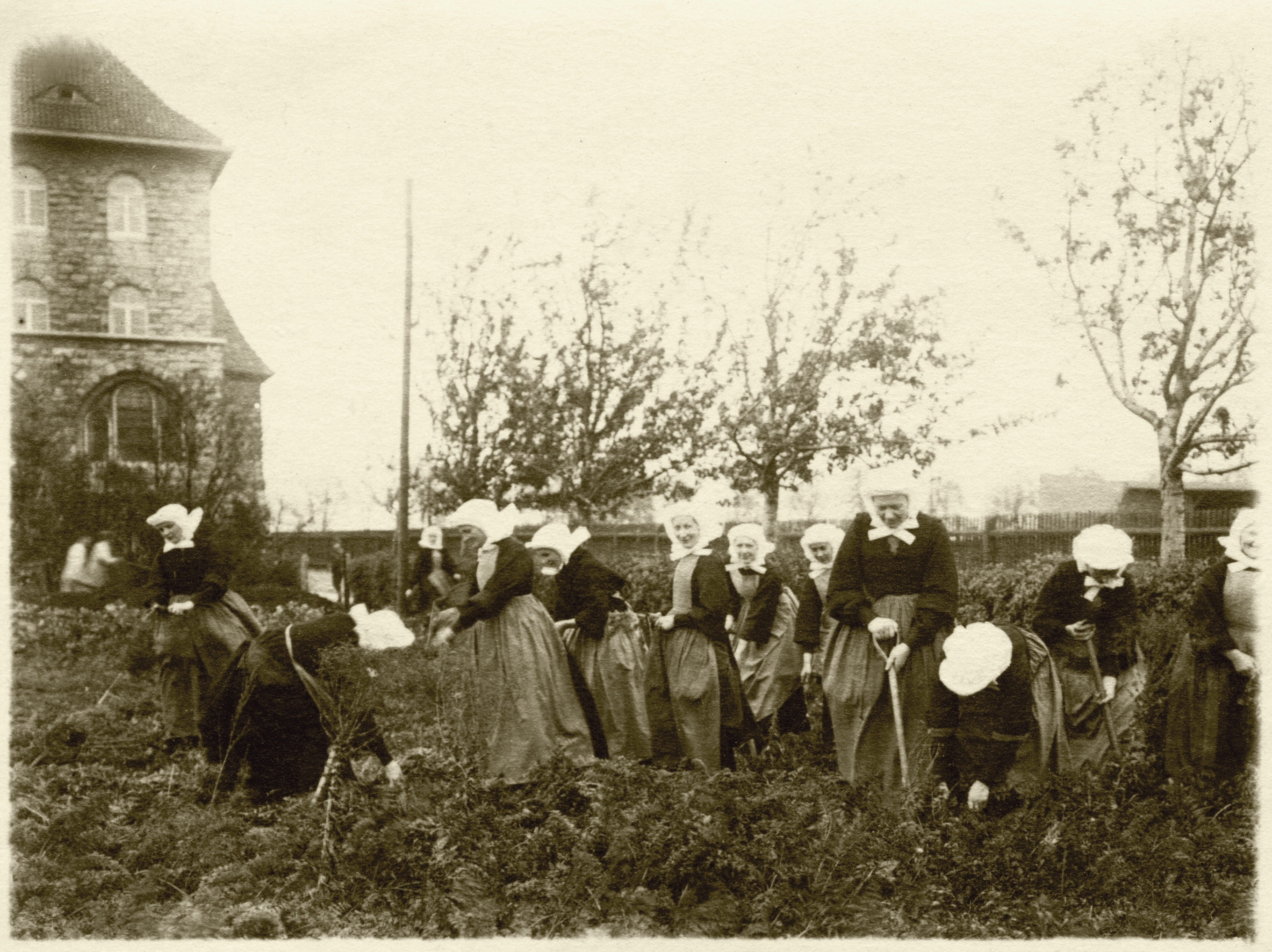 St. Marienstift Magdeburg 1911